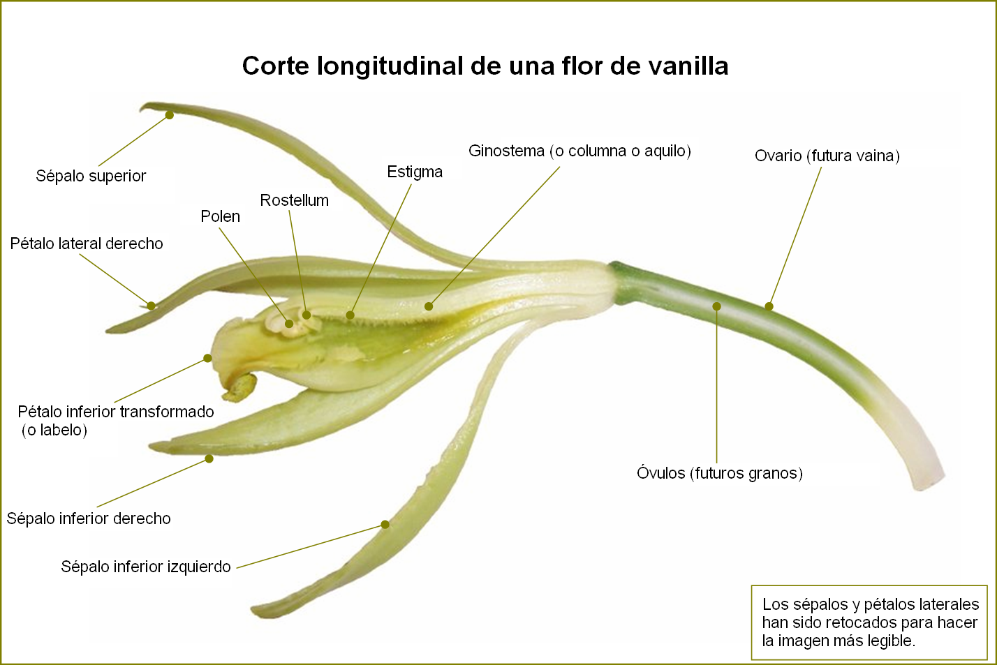 Photo & caption : B.navez - JAN 2006